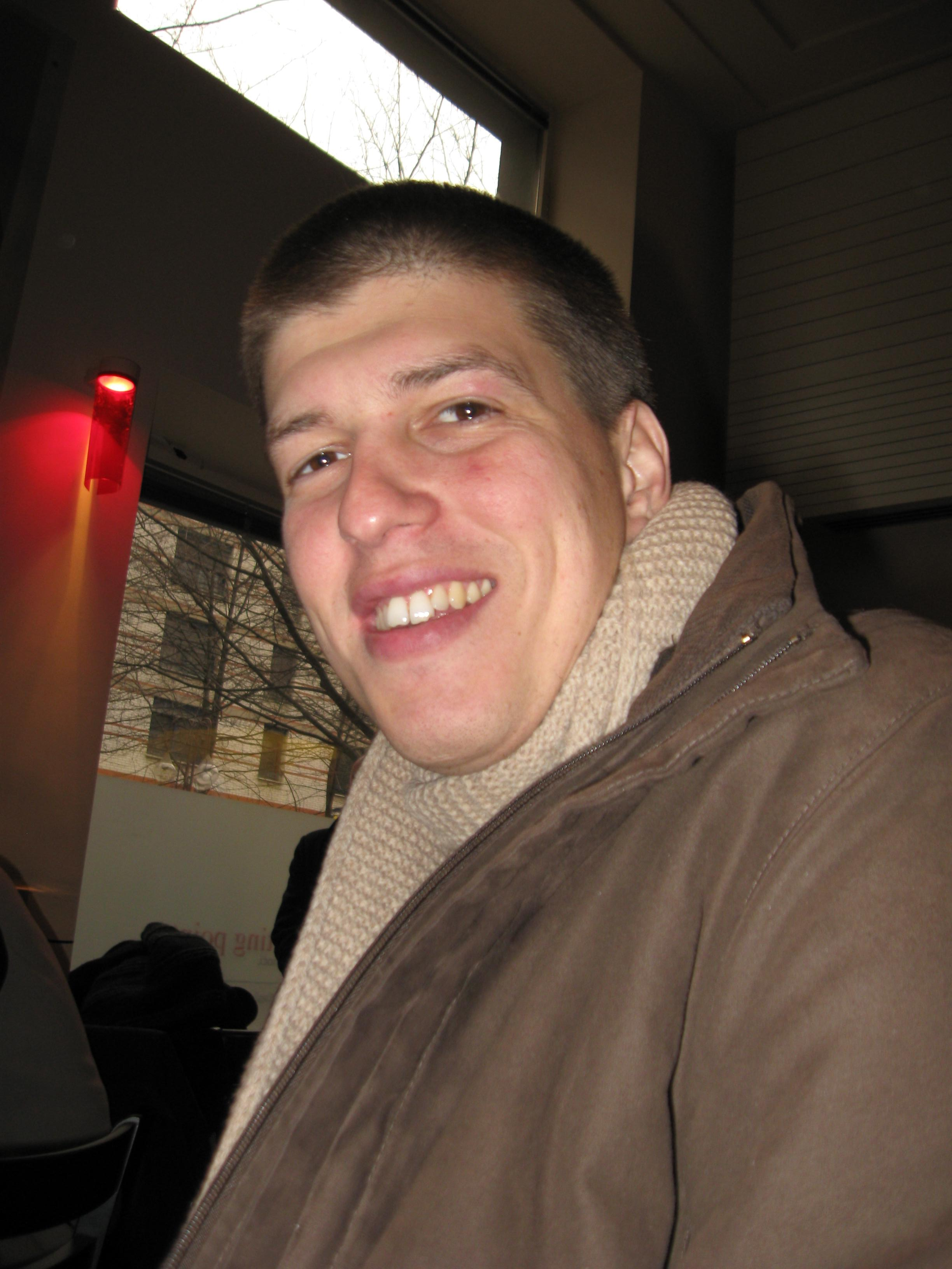 Goran Vojnović